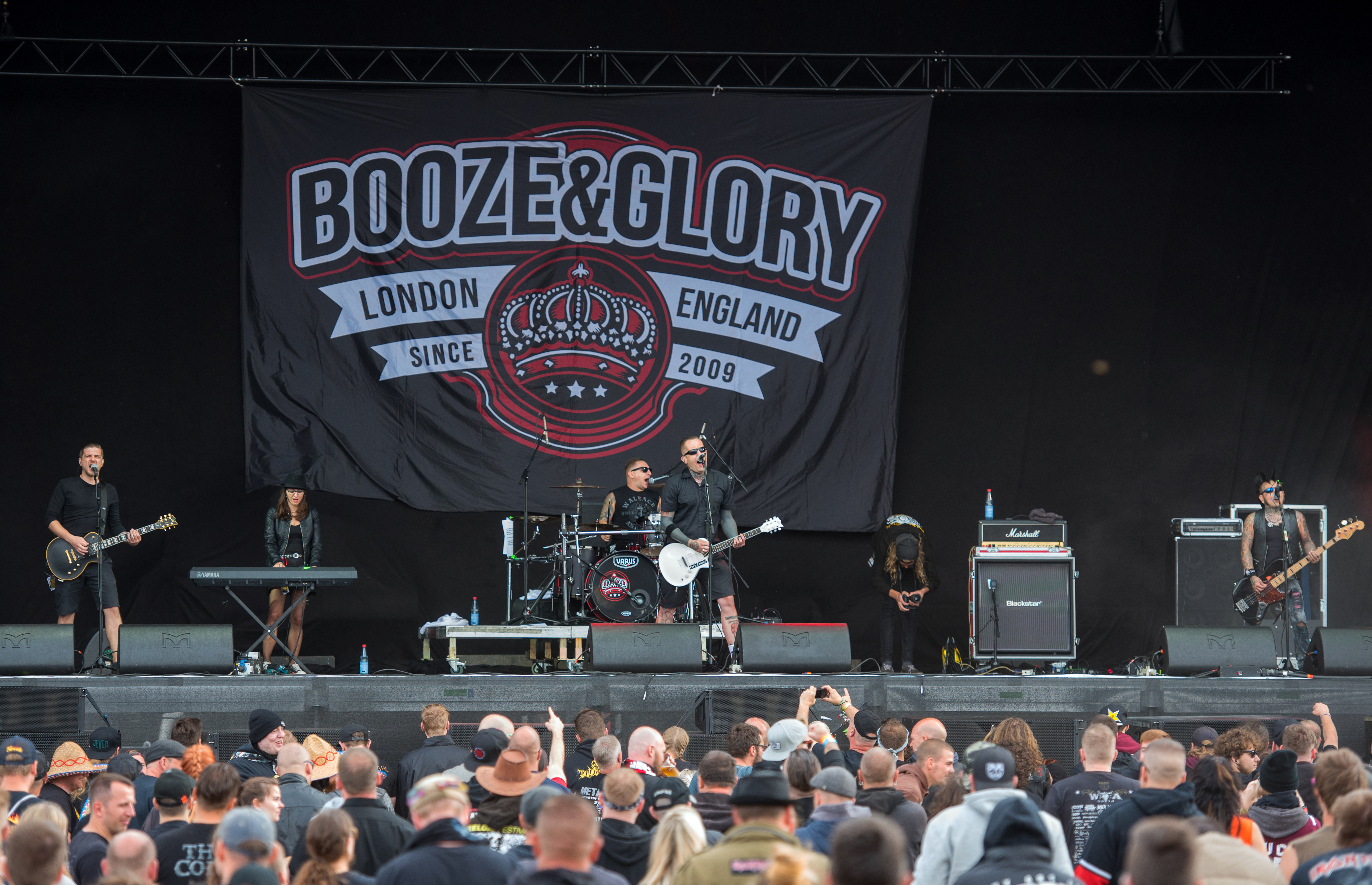 Booze & Glory auf dem Reload Festival 2018